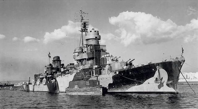 Regia Marina´s light cruiser Scipione Africano.